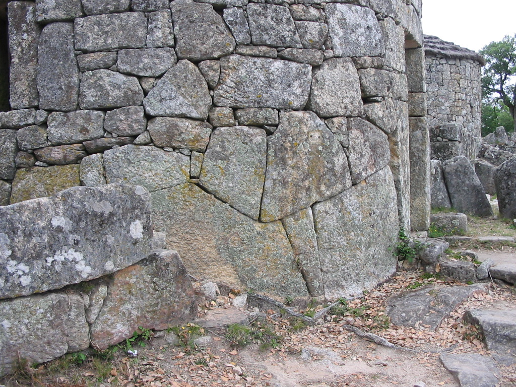 Citania de Briteiros (Portugal). Detalle de sillería en muro de vivienda